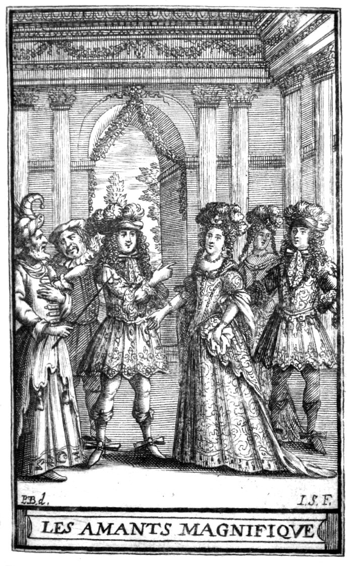 Moliere, 'Les Amants magnifiques', acte I, sc. 2